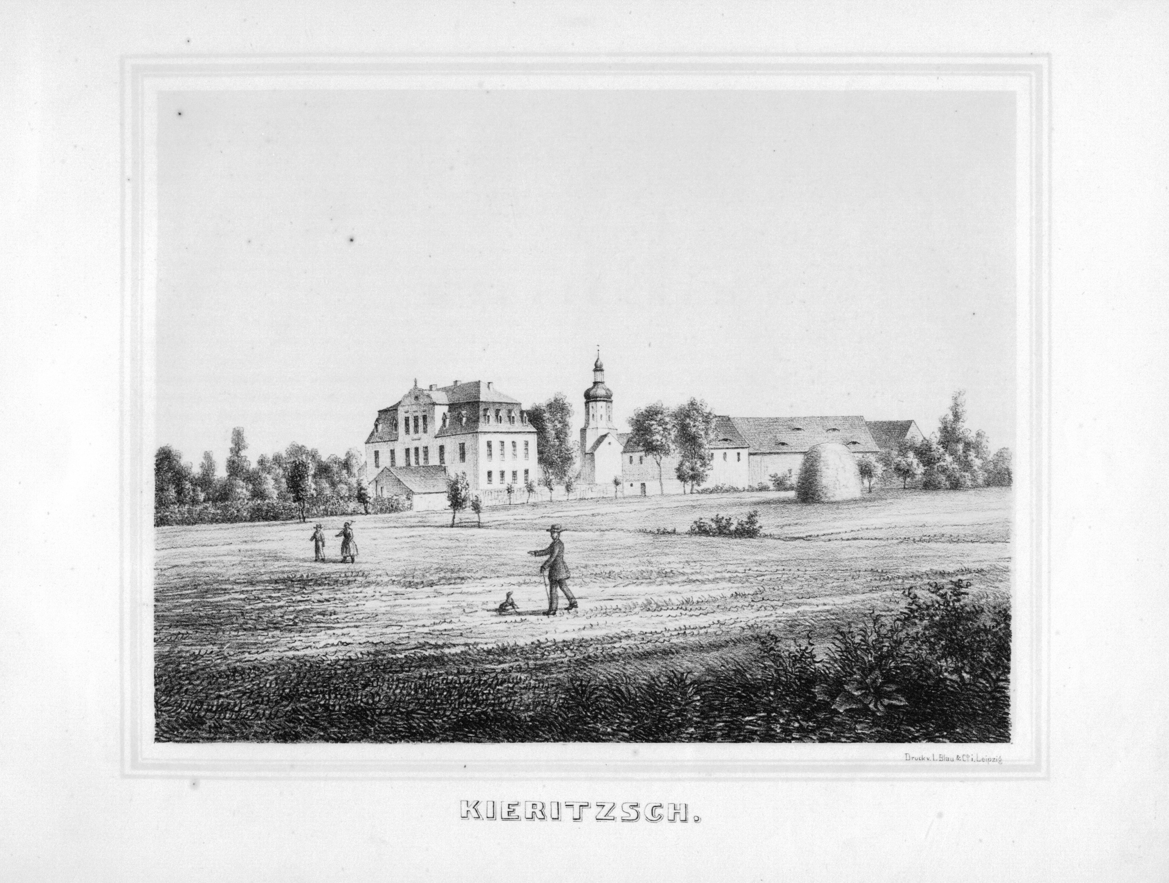 Kieritzsch aus: Album der Rittergüter und Schlösser im Königreiche Sachsen Leipziger Kreis Section: I